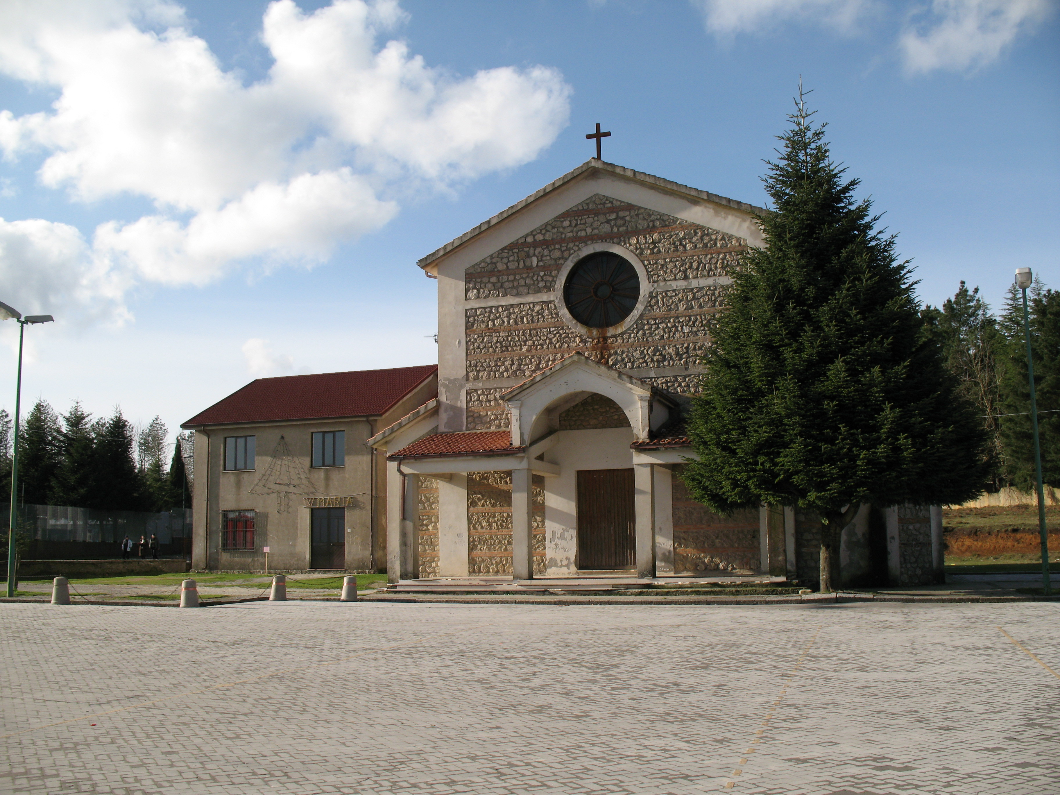 Canolo (RC), frazione Canolo Nuovo, chiesa